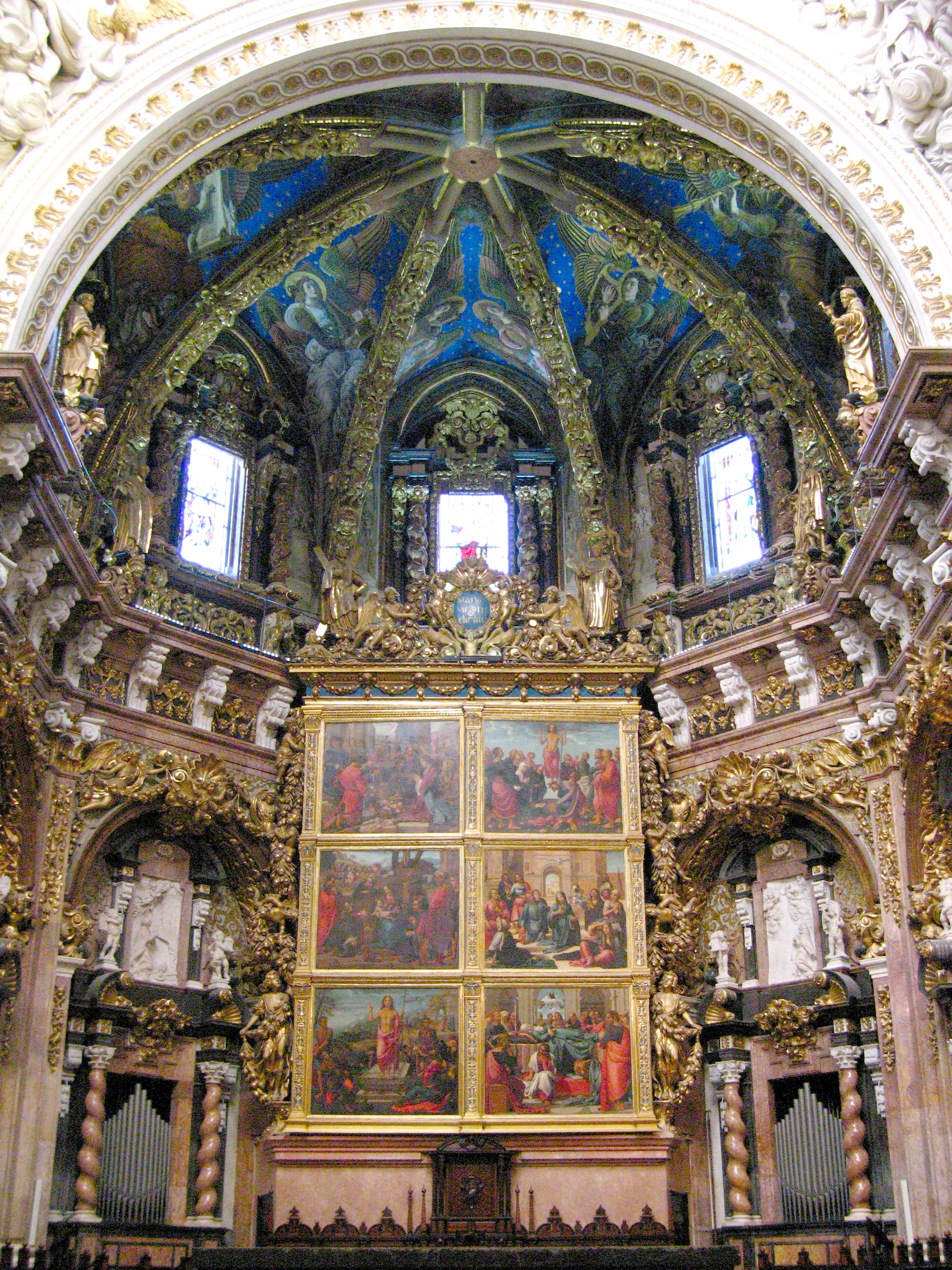 Presbiteri seu València